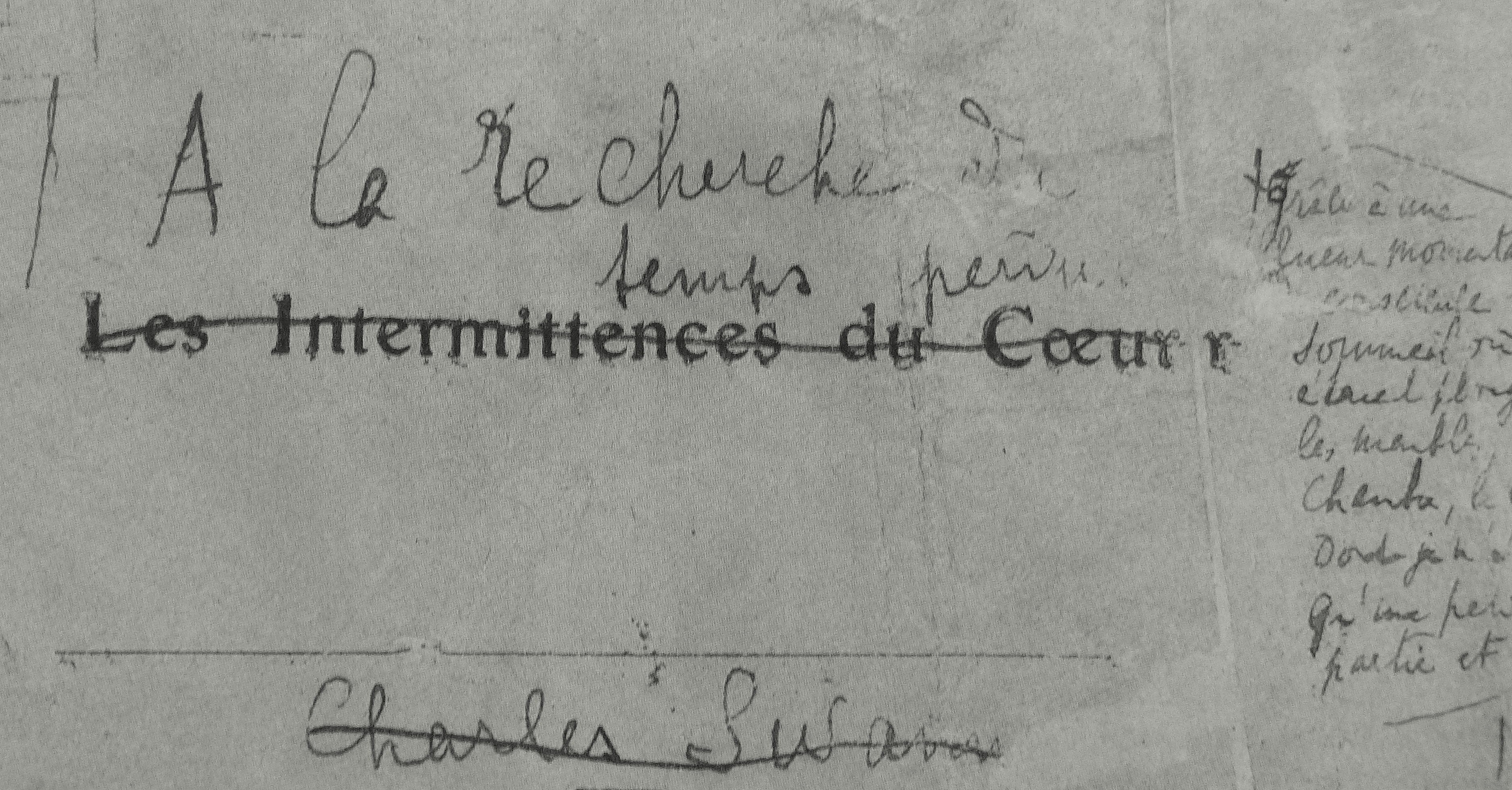 À la recherche du temps perdu, Tome 1: Du côté de chez Swann; Galley proof